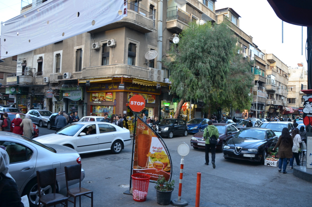 سوق الشعلان